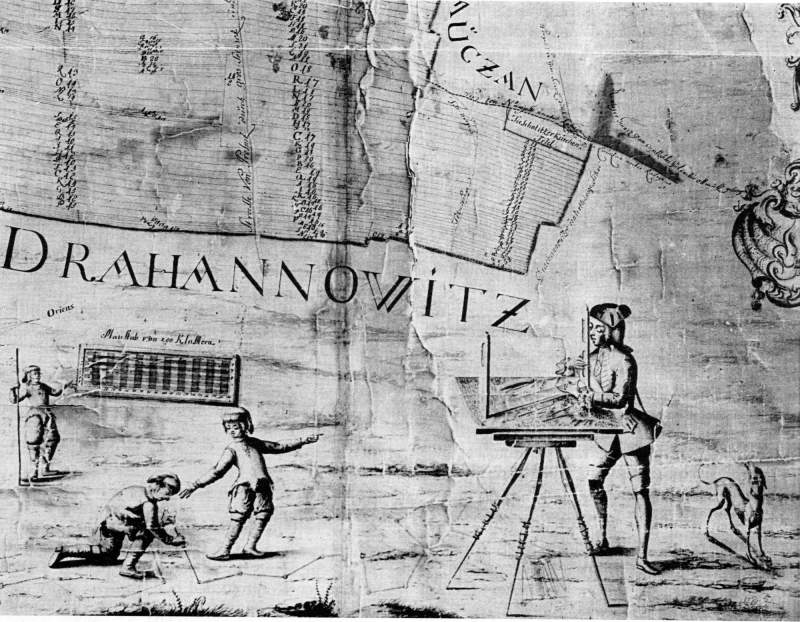 Paperga mapy panství Náměšť na Hané z roku 1746 se vzácným obrazem vyměřování polností